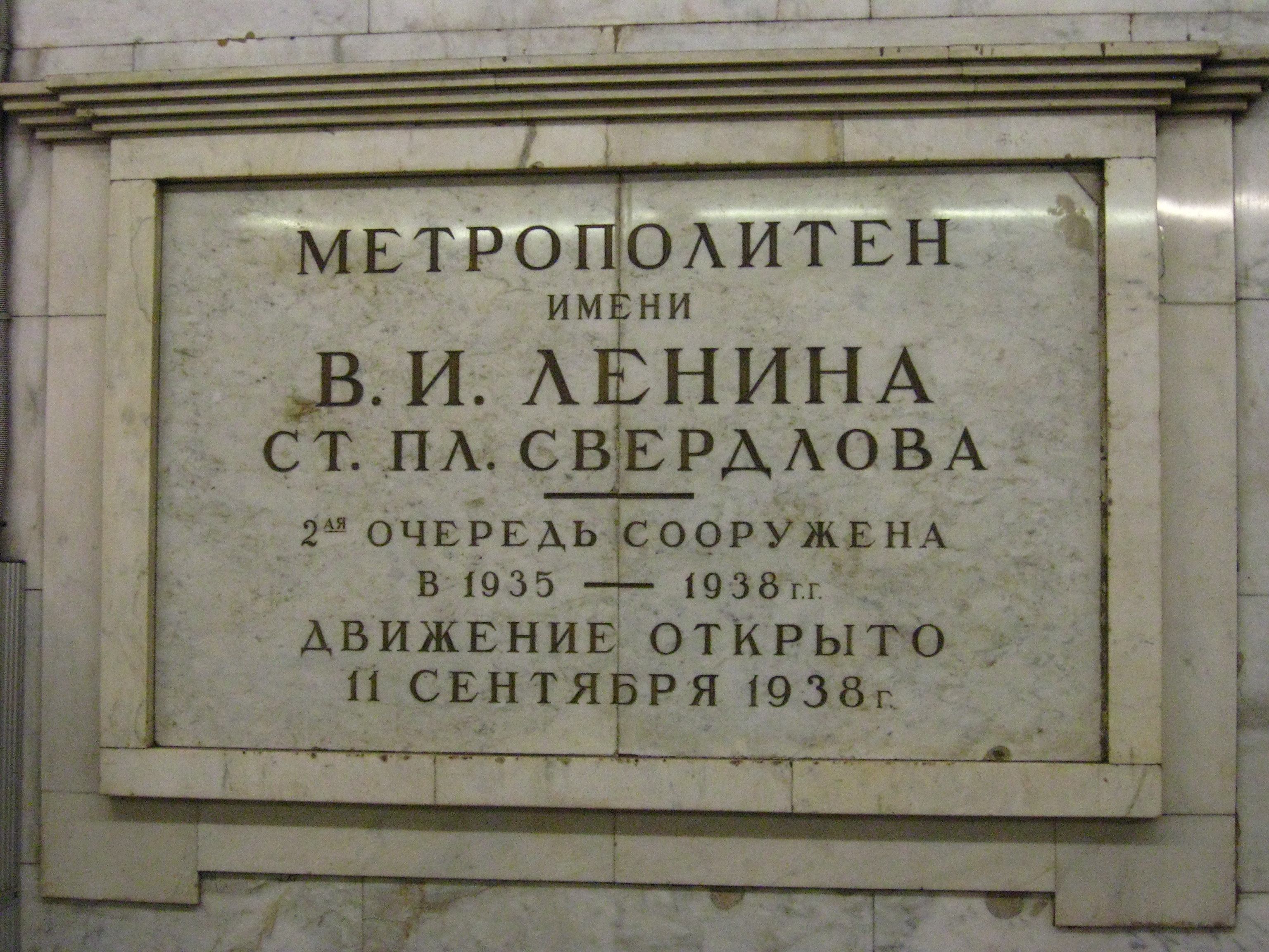 Памятная доска в ознаменования открытия станции Московского метрополитена - "Площадь им.Свердлова" (ныне "Театральная")